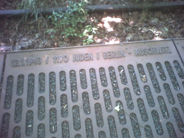 לוח באנדרטה ברציף 17 בתחנת הרכבת של גרונוולד - 1190 יהודים נשלחו לברלין - מקור ויקיפדיה בגרמנית